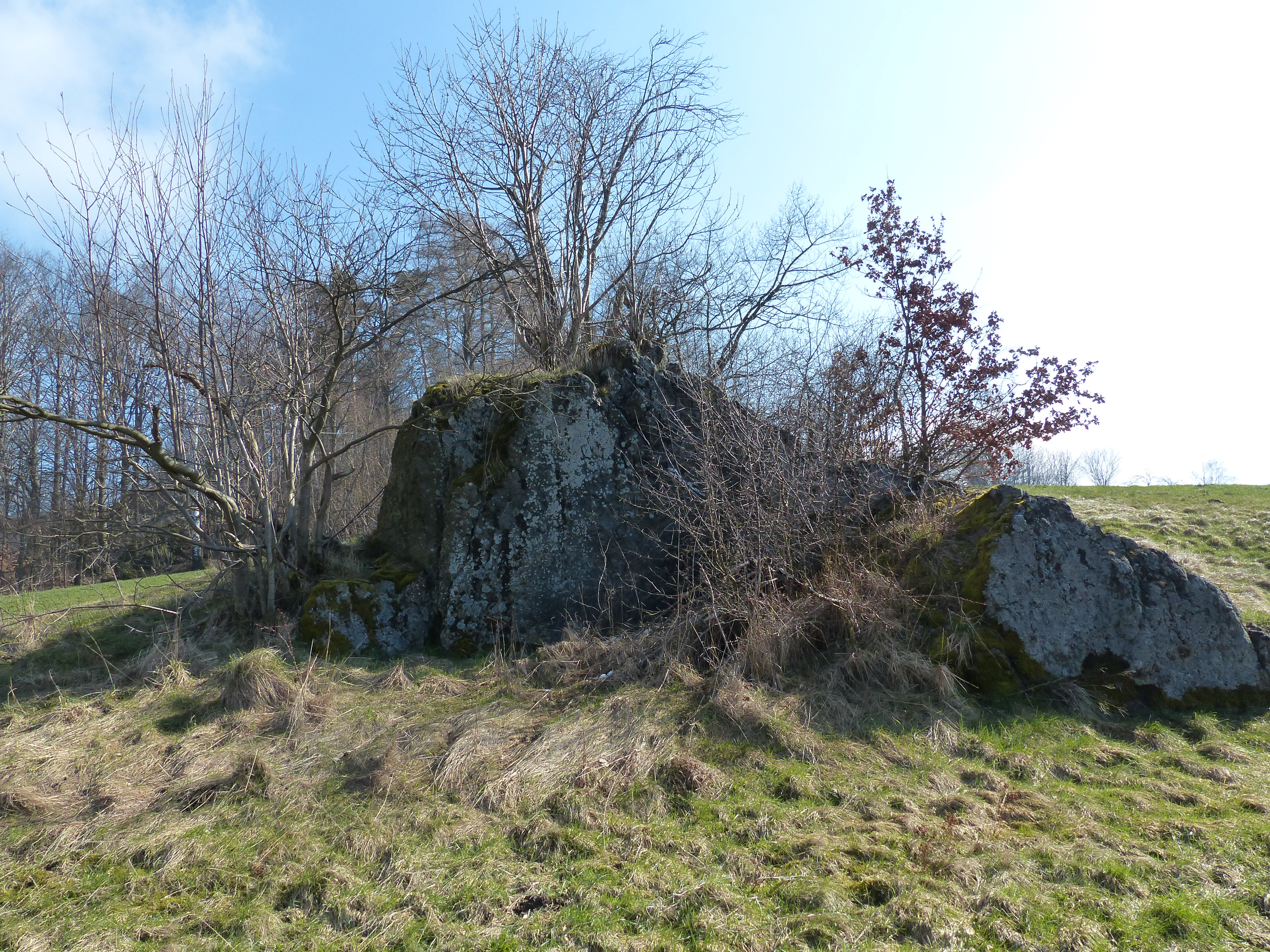 Geotop am Steinbühl, Gemeinde Sparneck